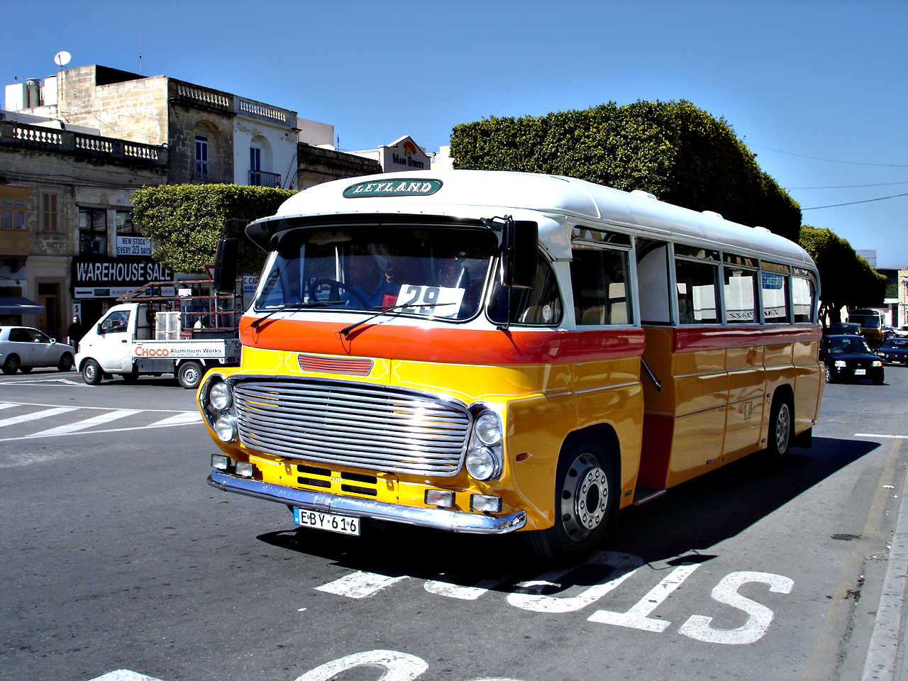 Andere bus op Malta